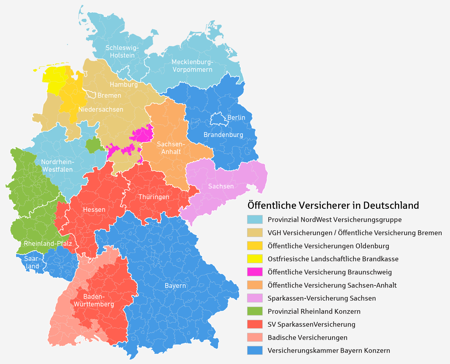 Karte der Öffentlichen Versicherer in Deutschland